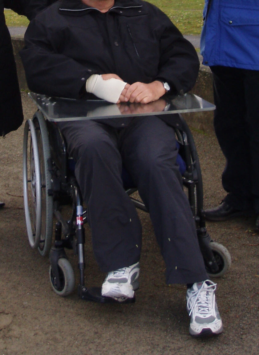 Hemiplegie nach Schlaganfall, Rollstuhl mit rechtsseitiger Fußstütze, Therapietisch und einseitigem Greifreifenüberzug